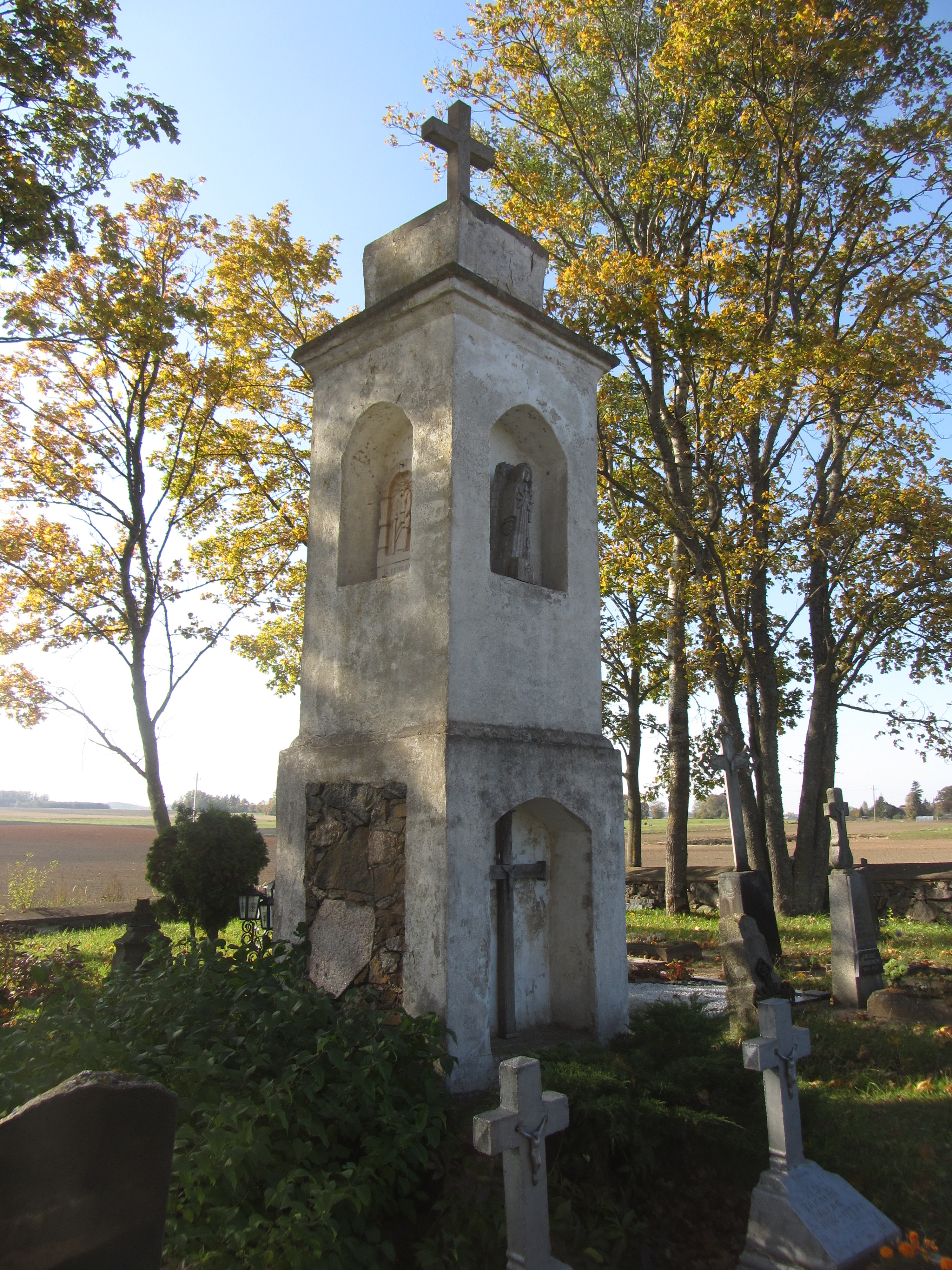 Pandėlio sen., Lithuania